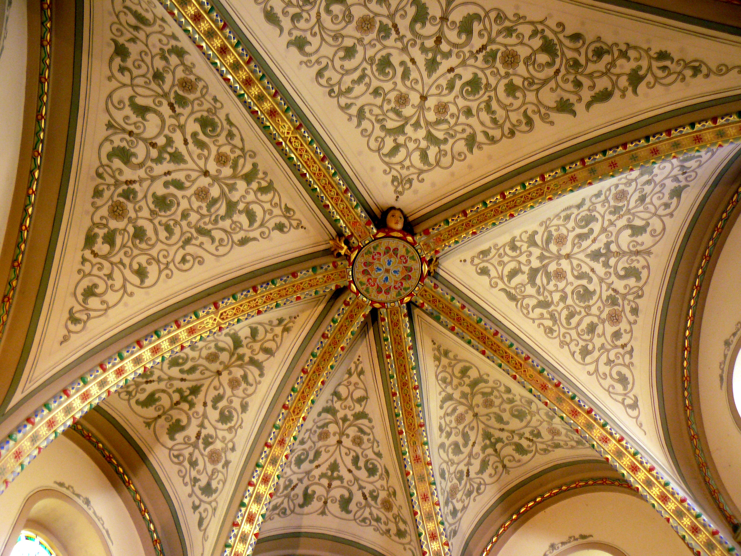 Plafond de la chapelle de Houppach, près Masevaux (Haut-Rhin, France). Restauré par Louis Wiederkehr.